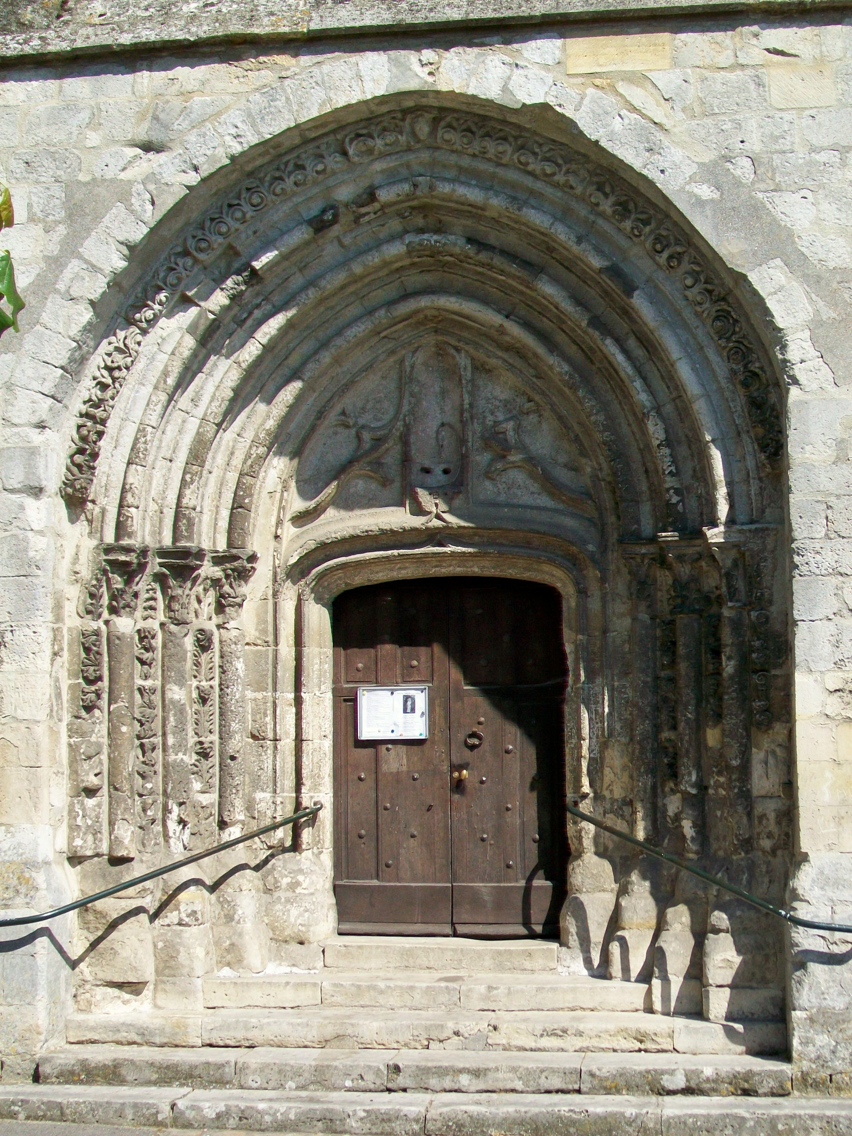 Le portail sud de l'église Saint-Barthélémy, l'un des éléments les plus remarquables de l'édifice. Le portail ouest n'a qu'une allures très modeste.